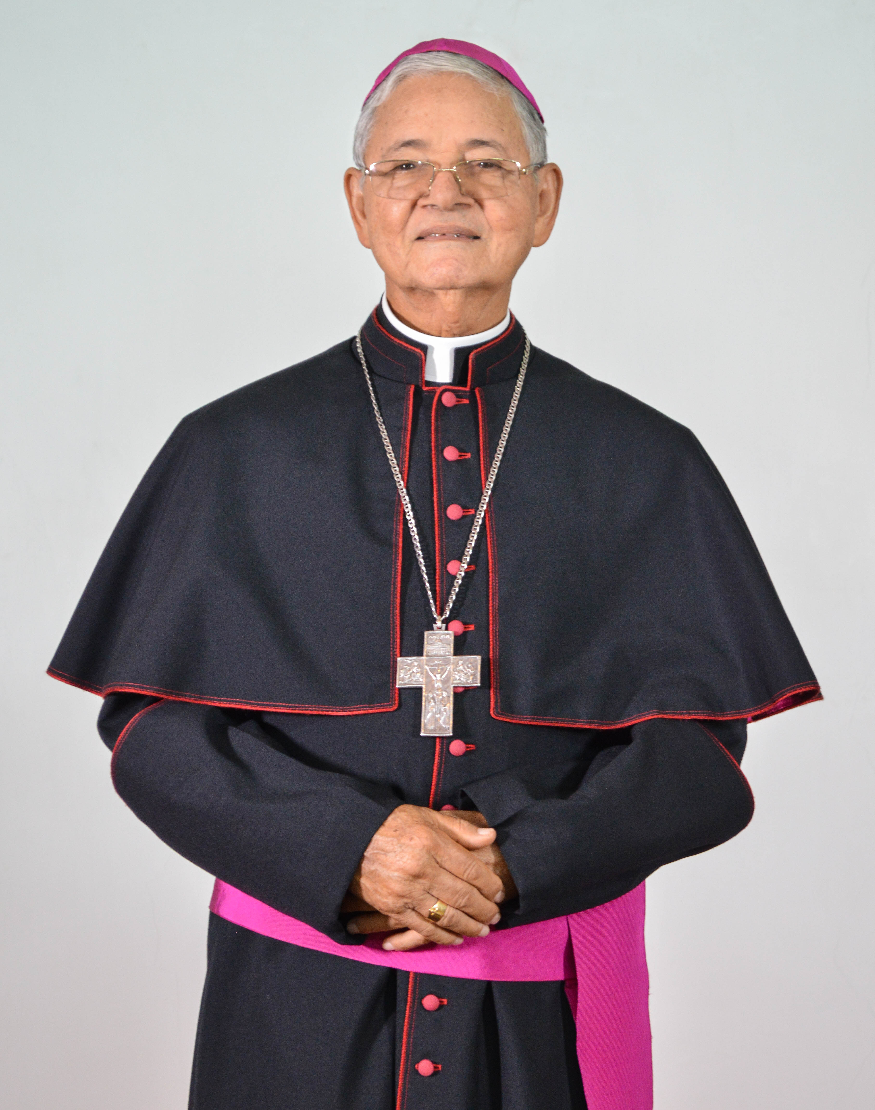 Foto 2018. Obispo auxiliar emérito de Santo Domingo.